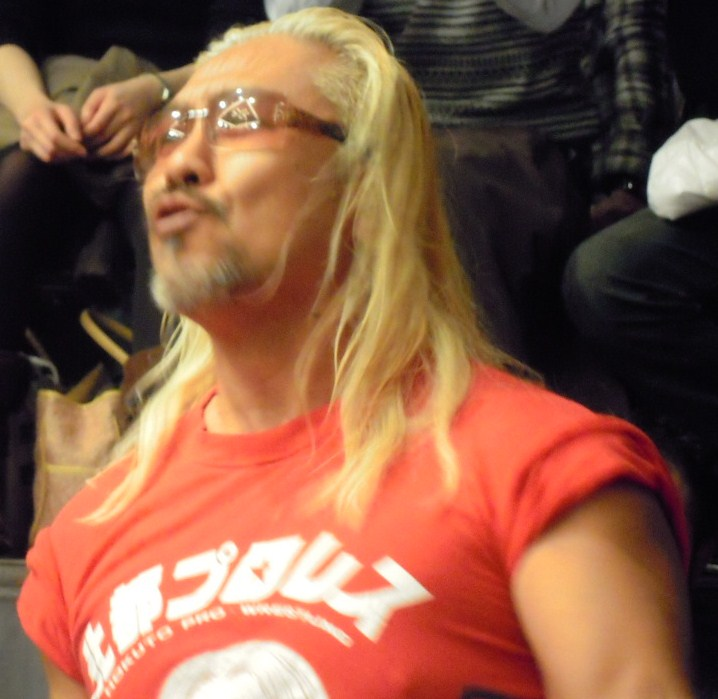 リッキー・フジ 2010年12月31日 大晦日年越しプロレス2010カウントダウンスペシャル 後楽園ホール大会 投稿者撮影